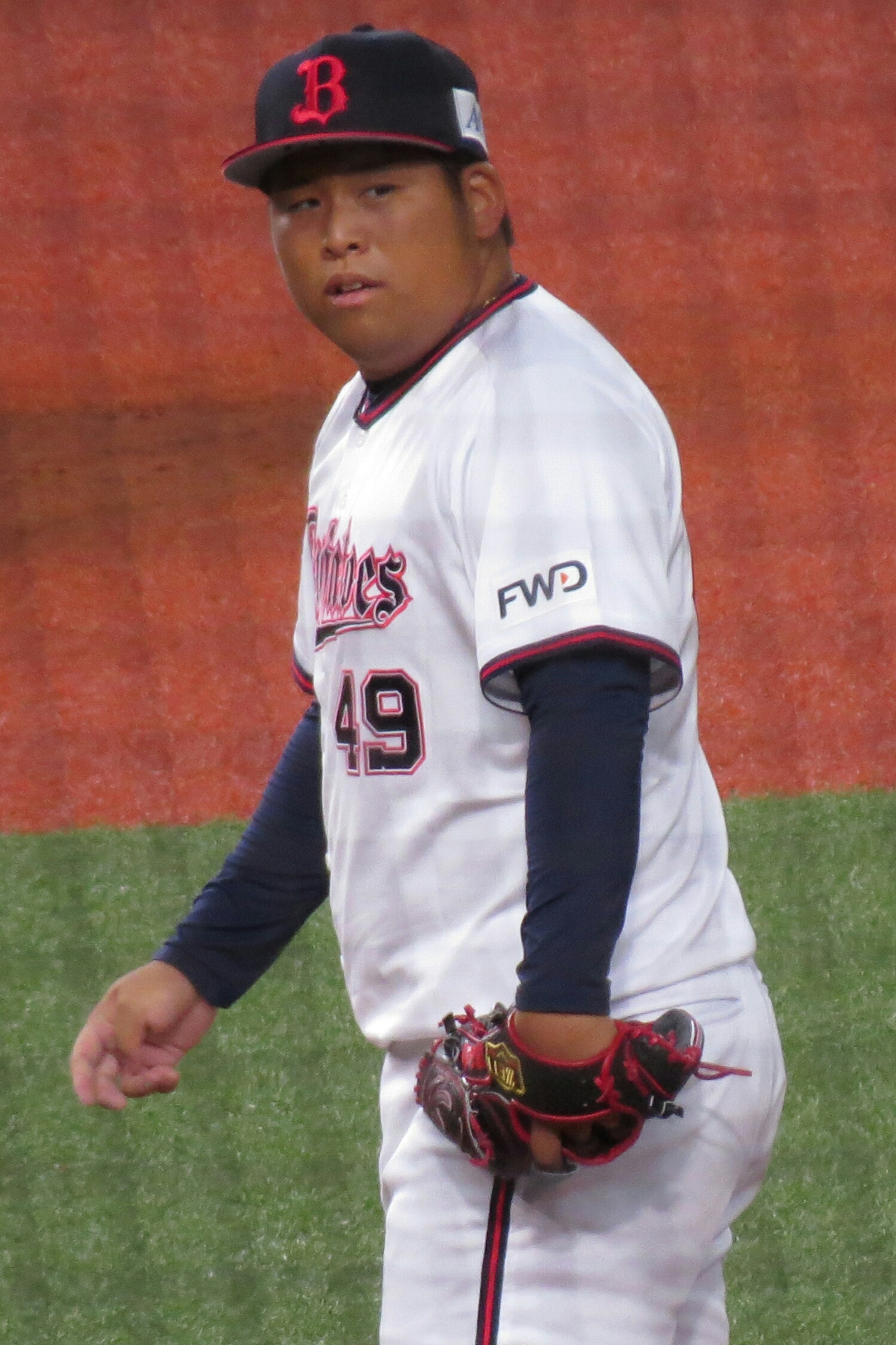 澤田圭佑